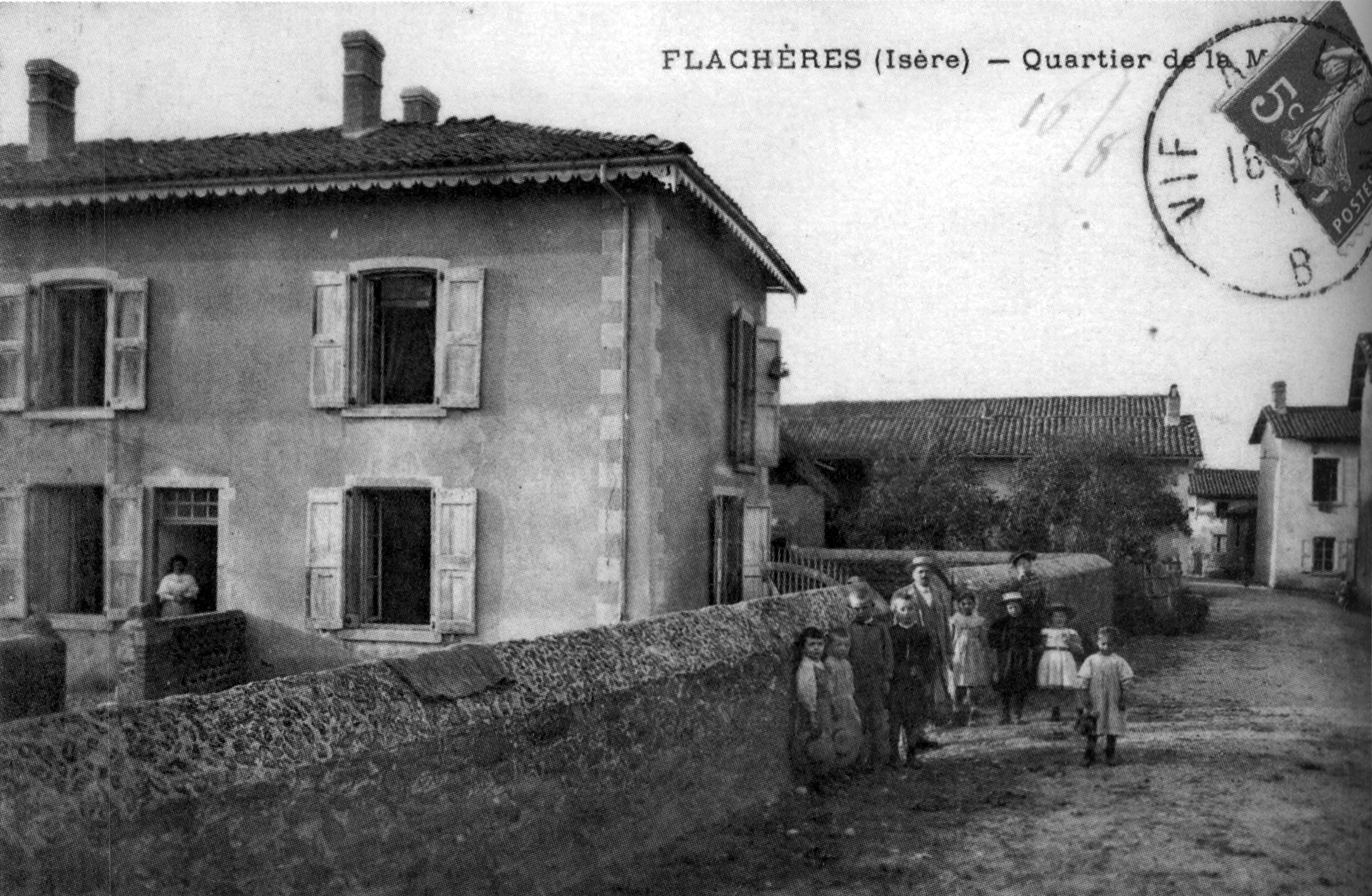 Flachères, quartier de la mairie en 1913